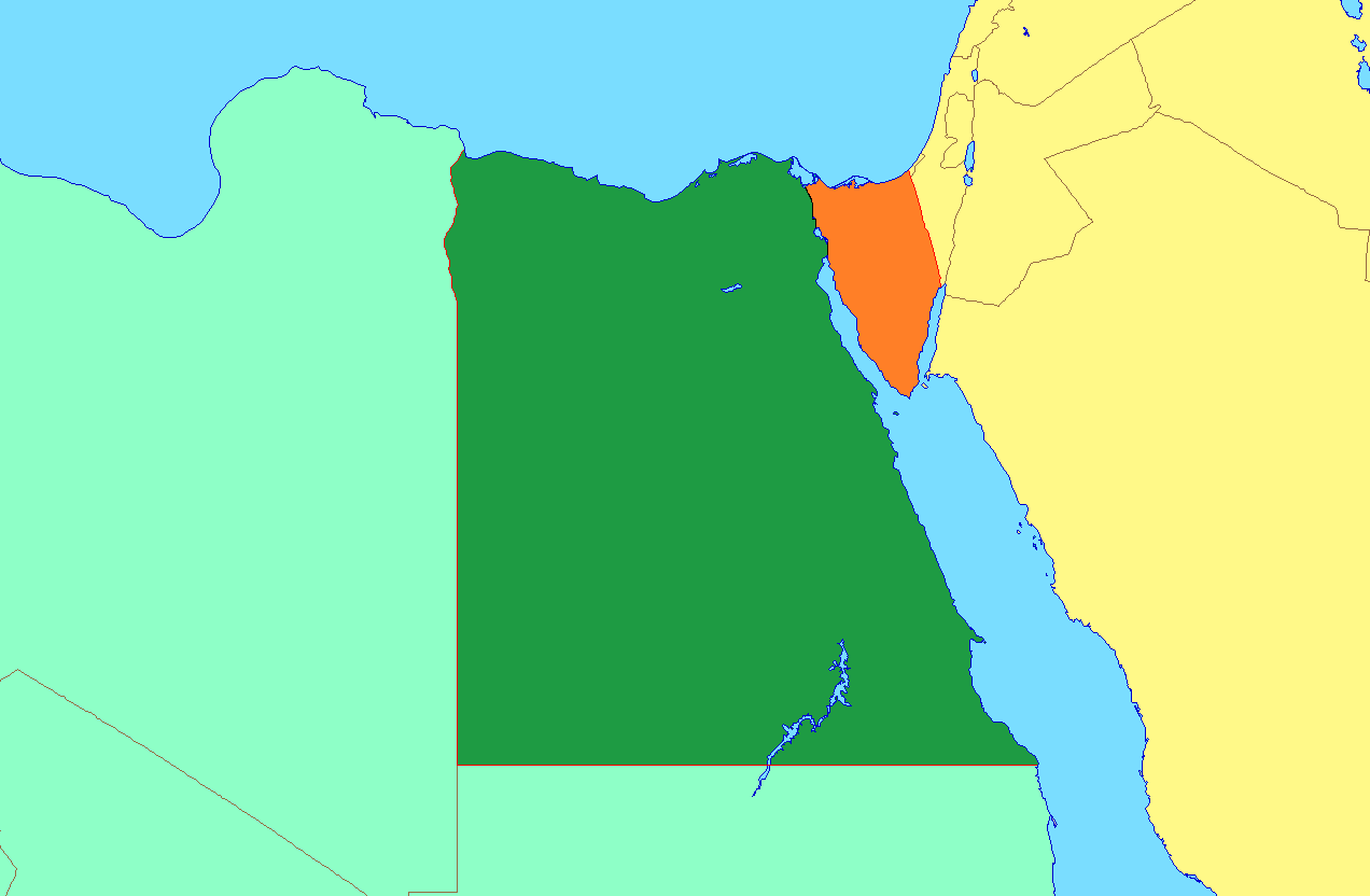 شطري مصر الإفريقي والآسيوي